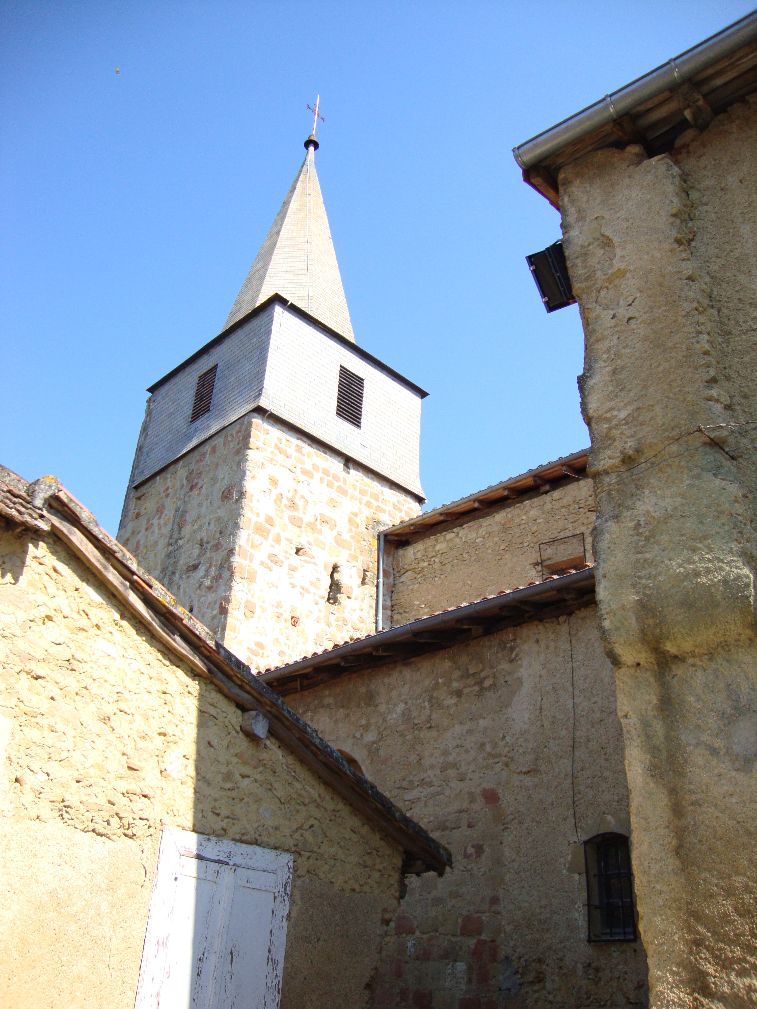 Montesquiou (Gers) tour de l'eglise St.Martin.